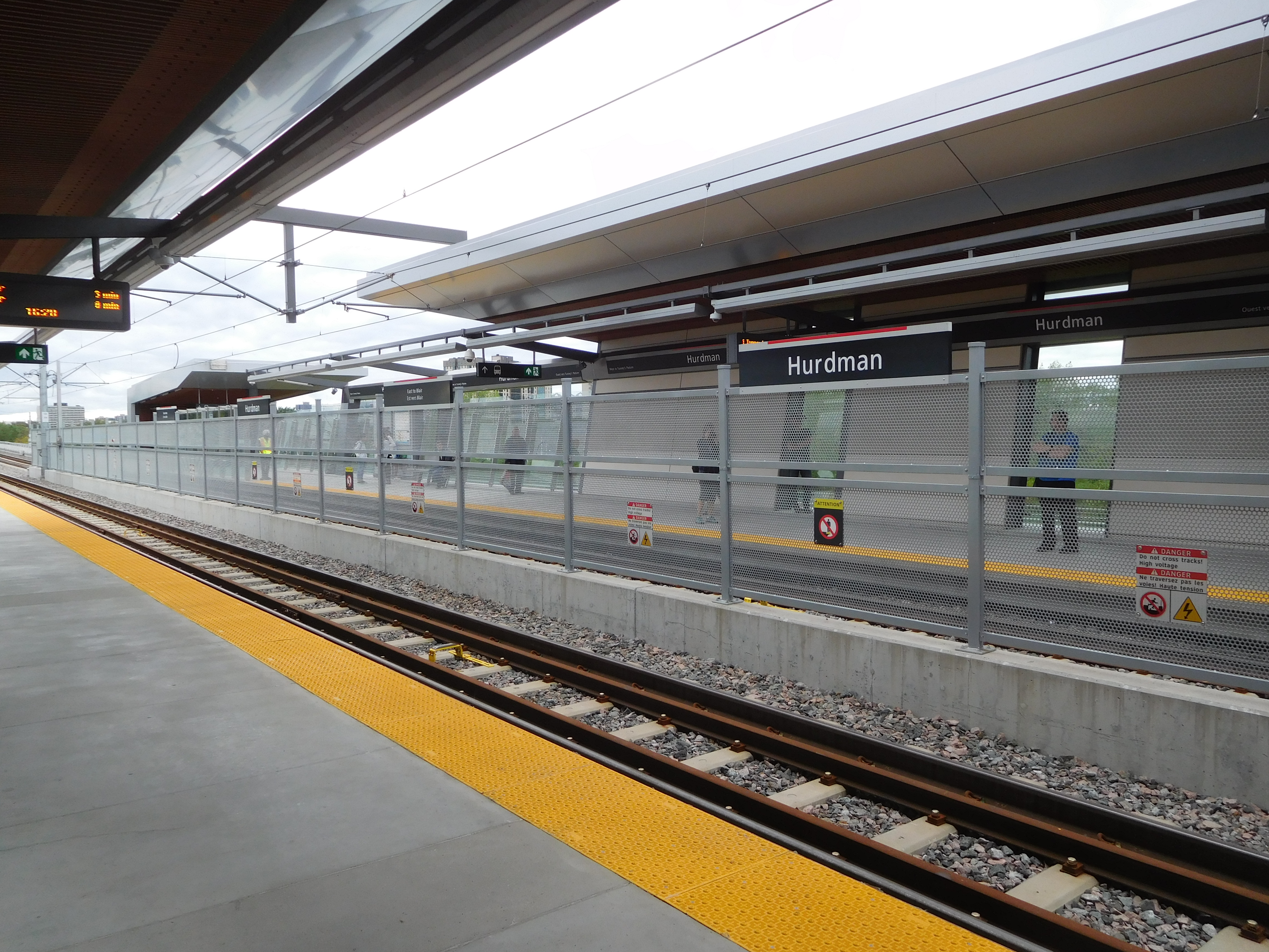 Station Hurdman de la ligne de la Confédération à Ottawa